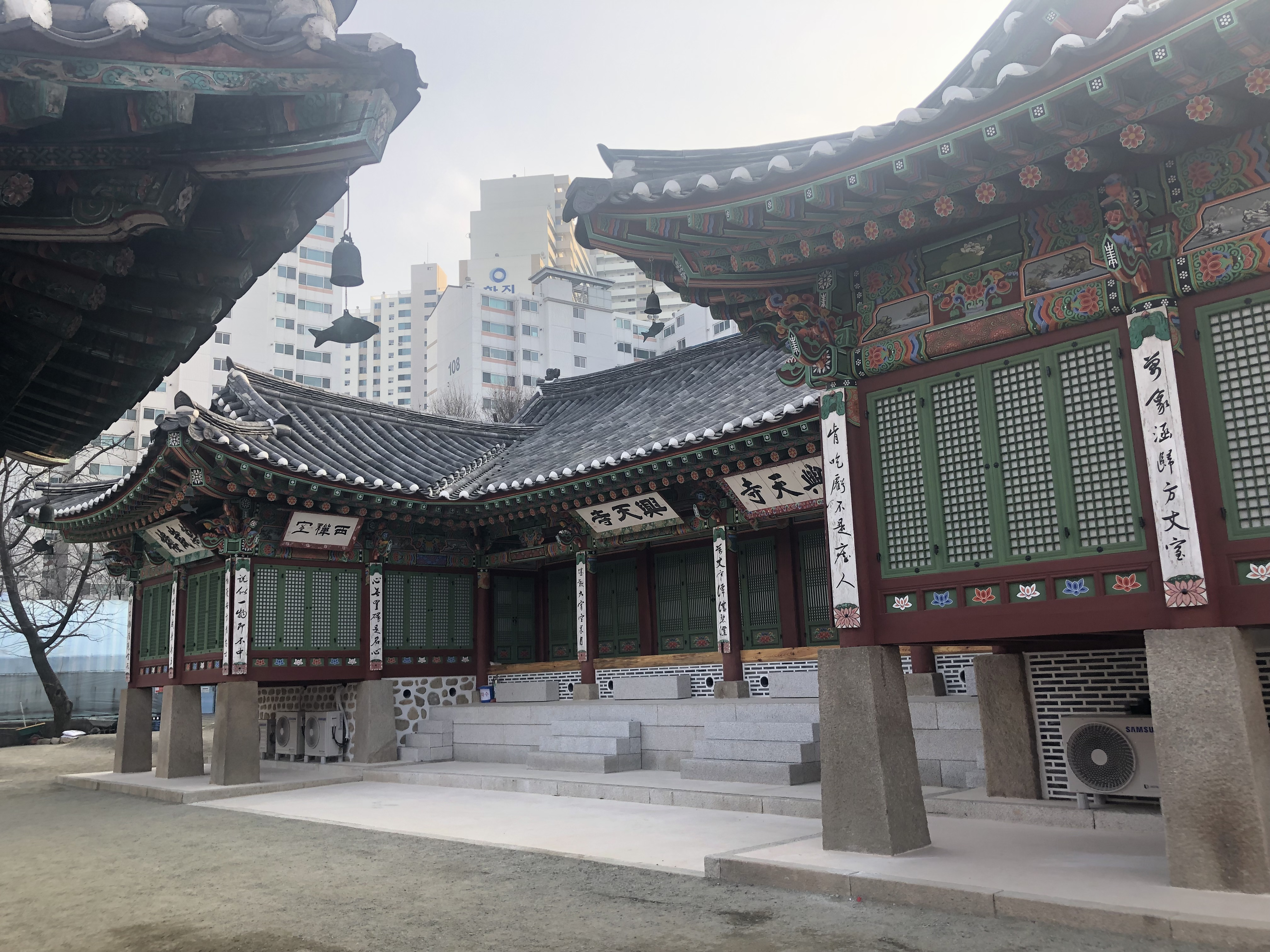 Daebang is the central part of Heungcheonsa Buddhist Temple, Seoul city in Korea.